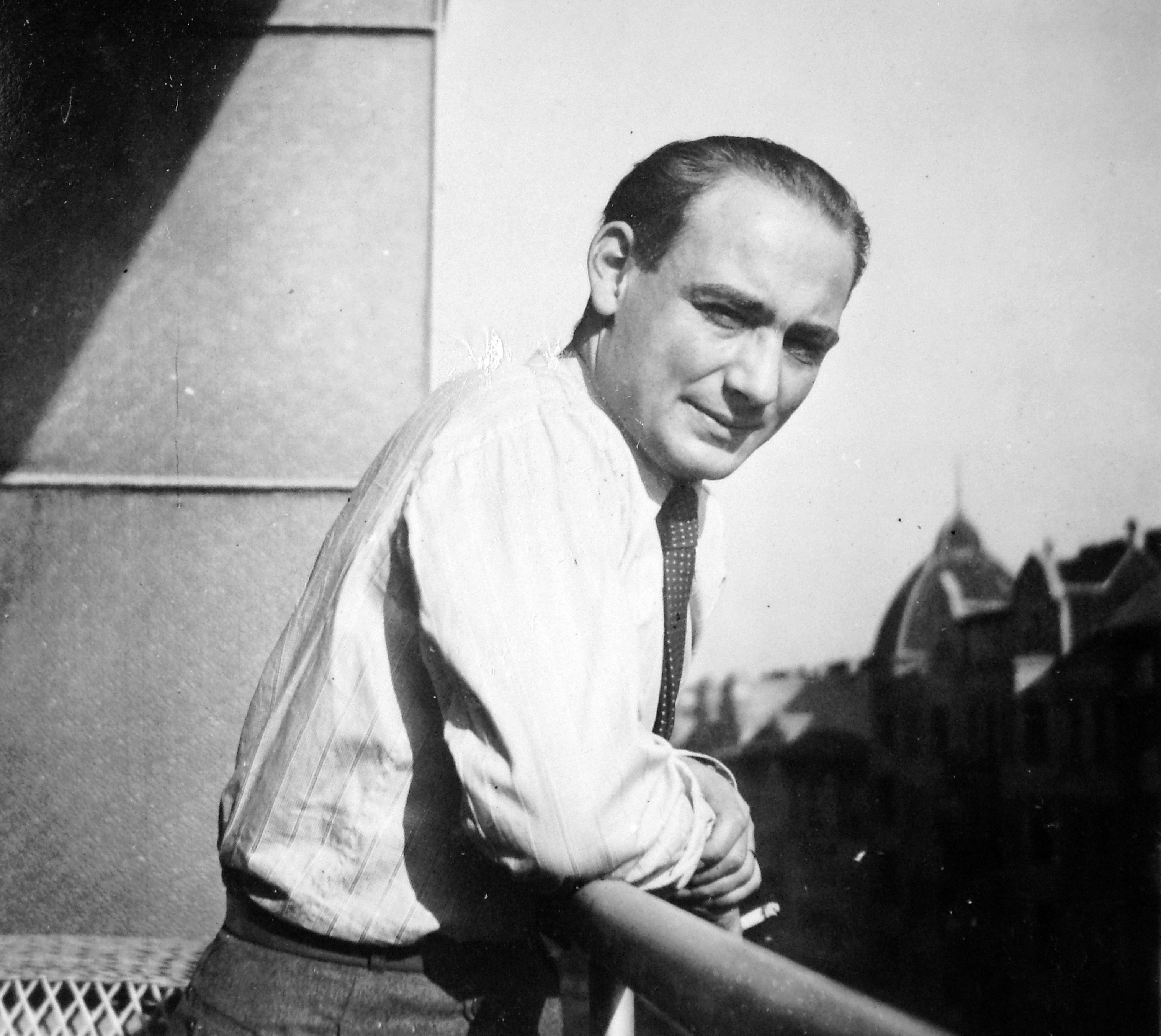 Gádoros Lajos építész a Margit körút 65. sz. alatti lakásának erkélyén. Location: Hungary, Budapest II. Tags: Budapest Title: Gádoros Lajos építész a Margit körút 65. sz. alatti lakásának erkélyén.